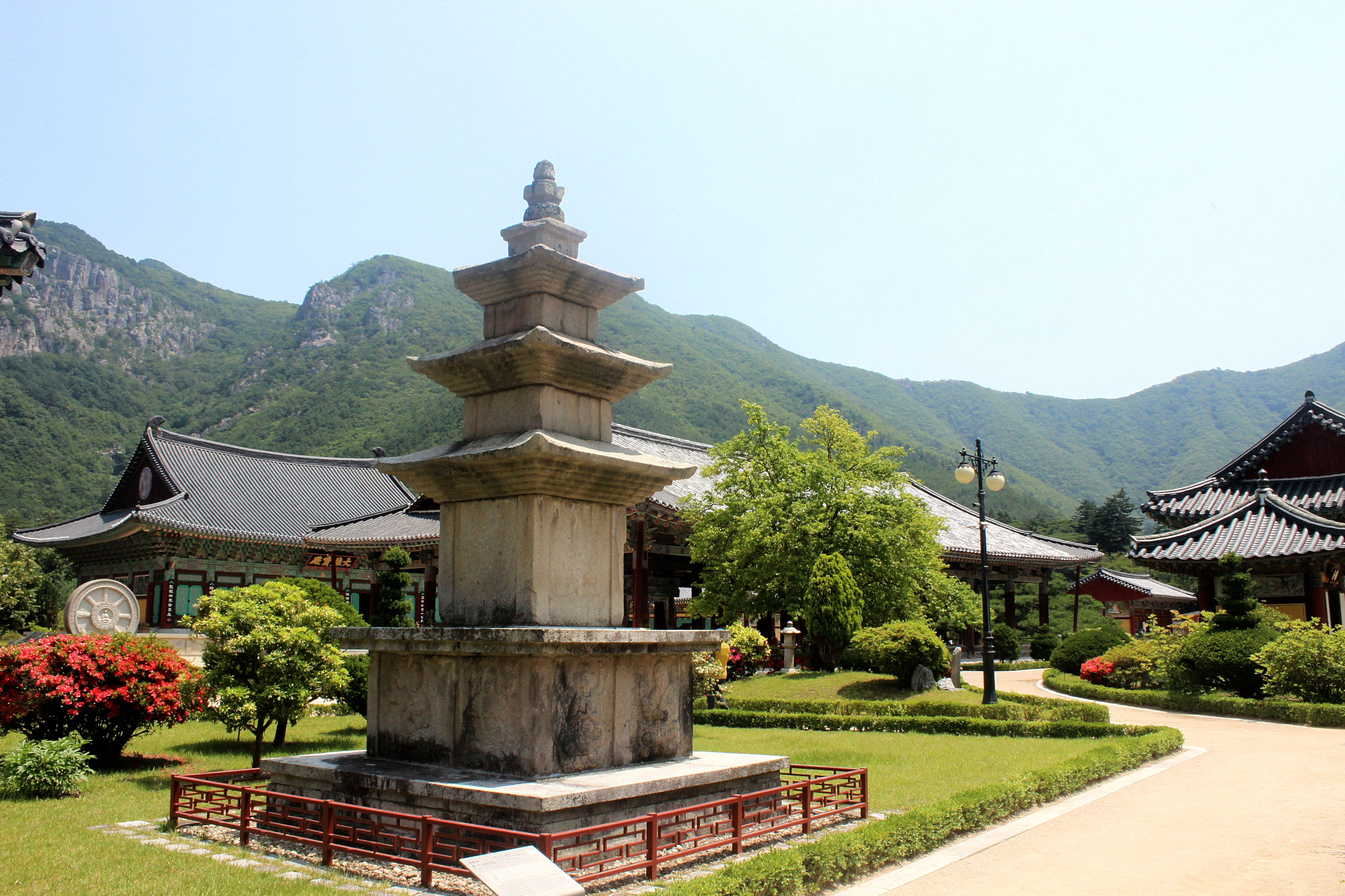 청도운문사 동·서 삼층석탑(2)